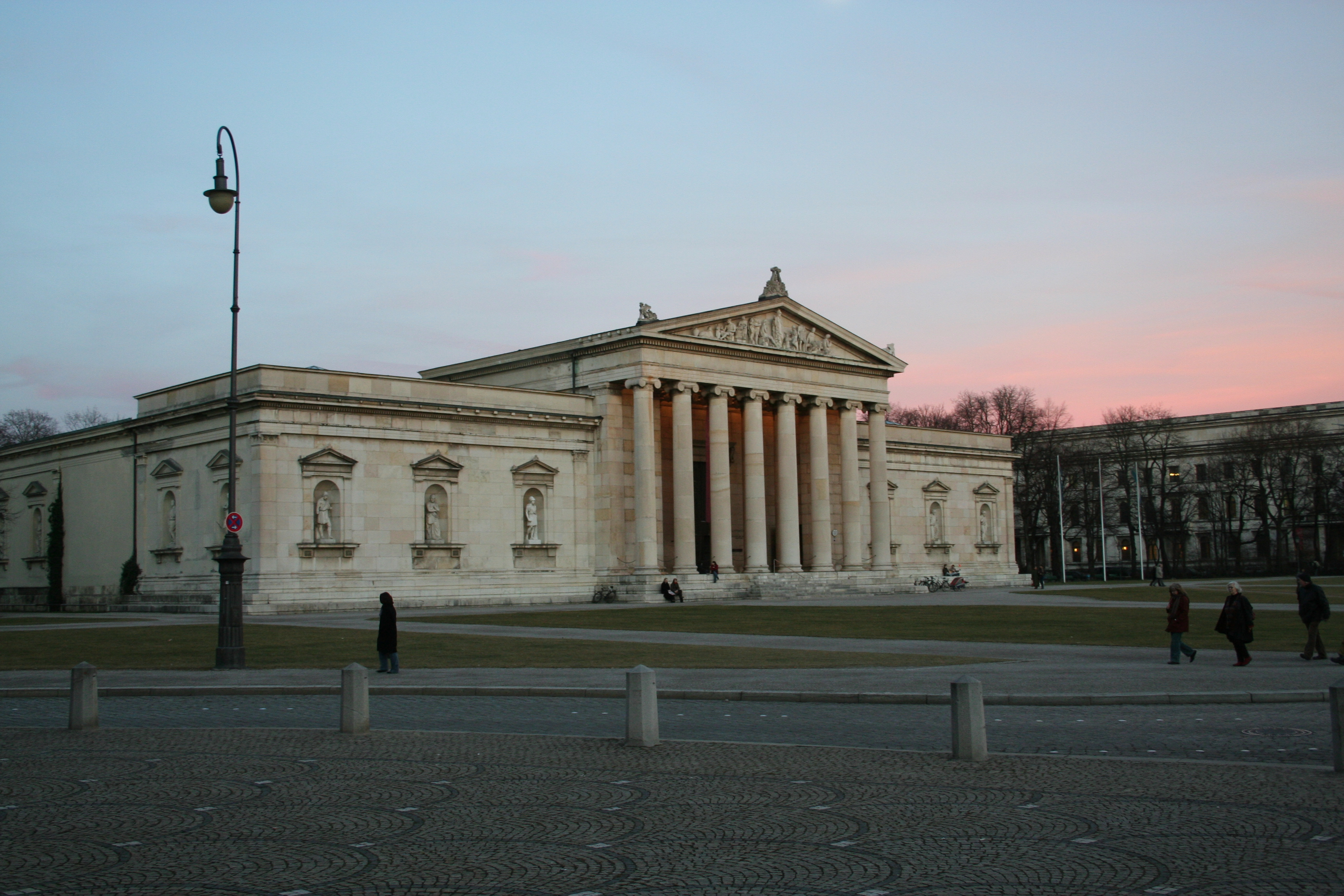 Glyptothek in München am Königsplatz